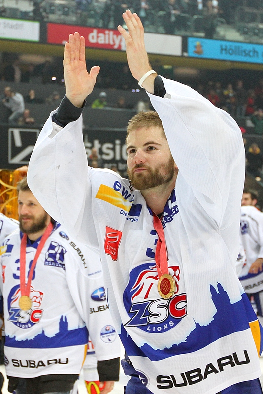 Steve McCarthy avec le maillot du ZSC Lions après la conquête du titre de champion de Suisse en 2012.